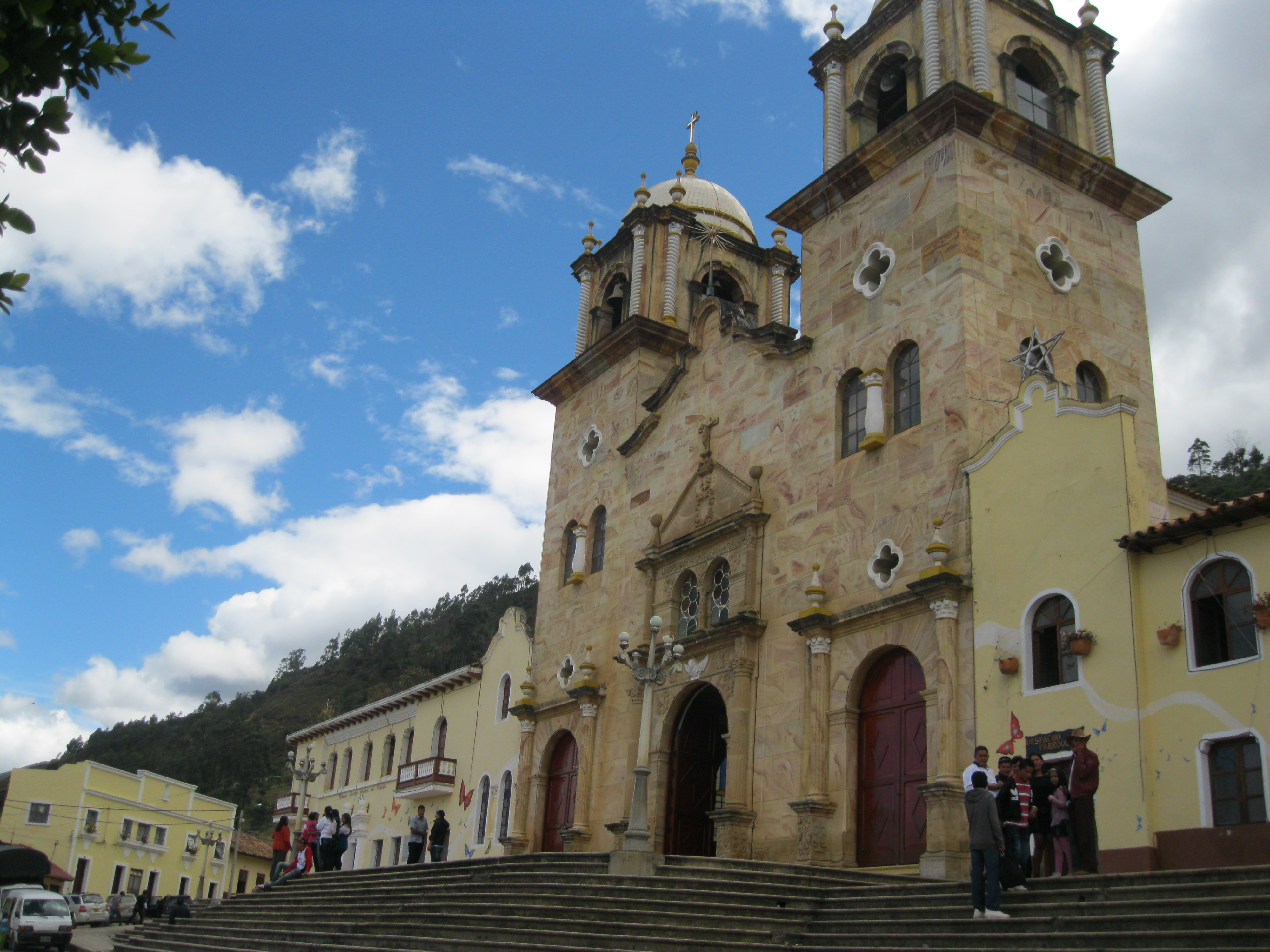 Iglesia y plaza central de Sativanorte, en el departamento de Boyacá - Colombia